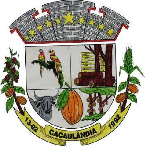 Brasão do município de Cacaulândia, Rondônia, Brasil.